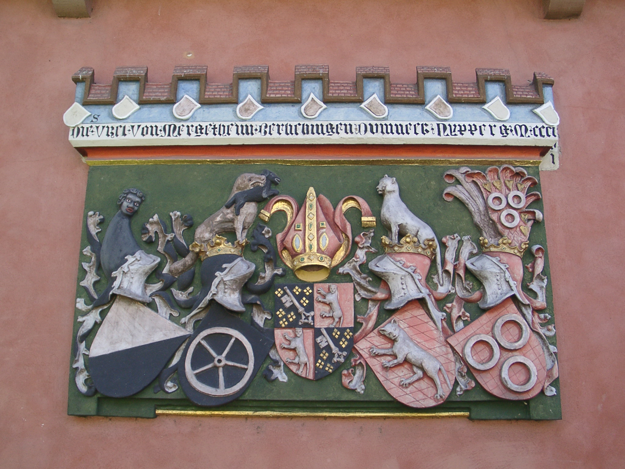 Ladenburg, Wappenreihe. Wappen des Wormser Bischofs Friedrich von Domneck (Domeneck), umschlossen von den Wappen der Ahnen: von Mergetheim, Berlichingen, Domneck, Nypperg (Neipperg).